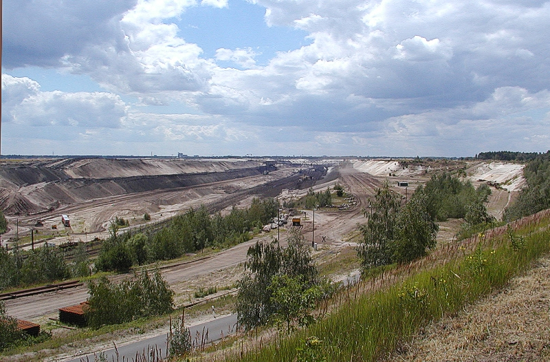 Tagebau Cottbus-Nord